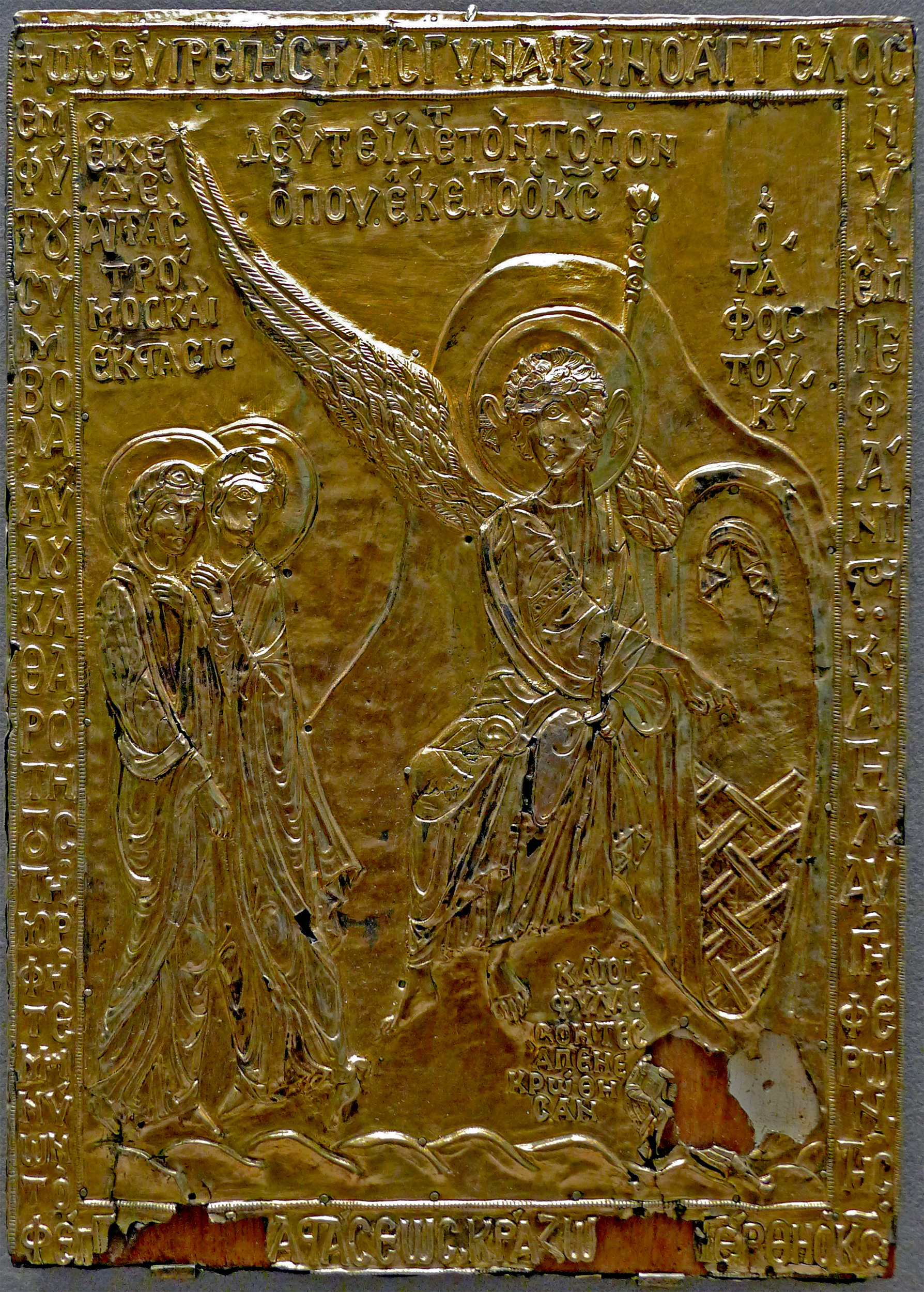 Plaque de reliquaire de la pierre du sépulcre du Christ montrant les Saintes femmes et un ange.